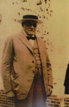 Domingo Bibolini (1849 - 1933): Acompaño a Luis Jorge Fontana en la Fundación de Formosa. Comerciante, ganadero y agente marítimo.